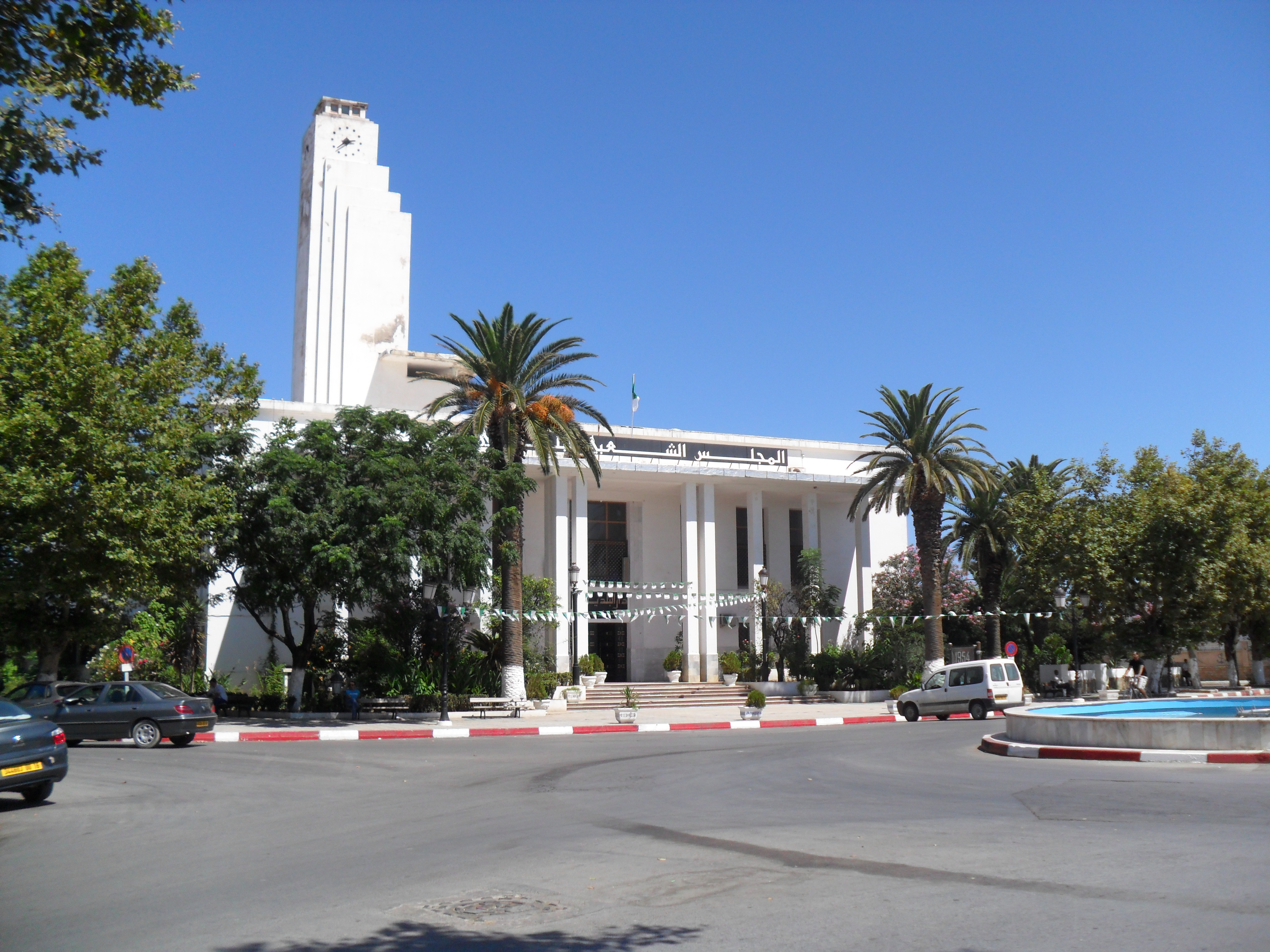 Siège de la Mairie de Jijel à la wilaya de jijel (Algérie)